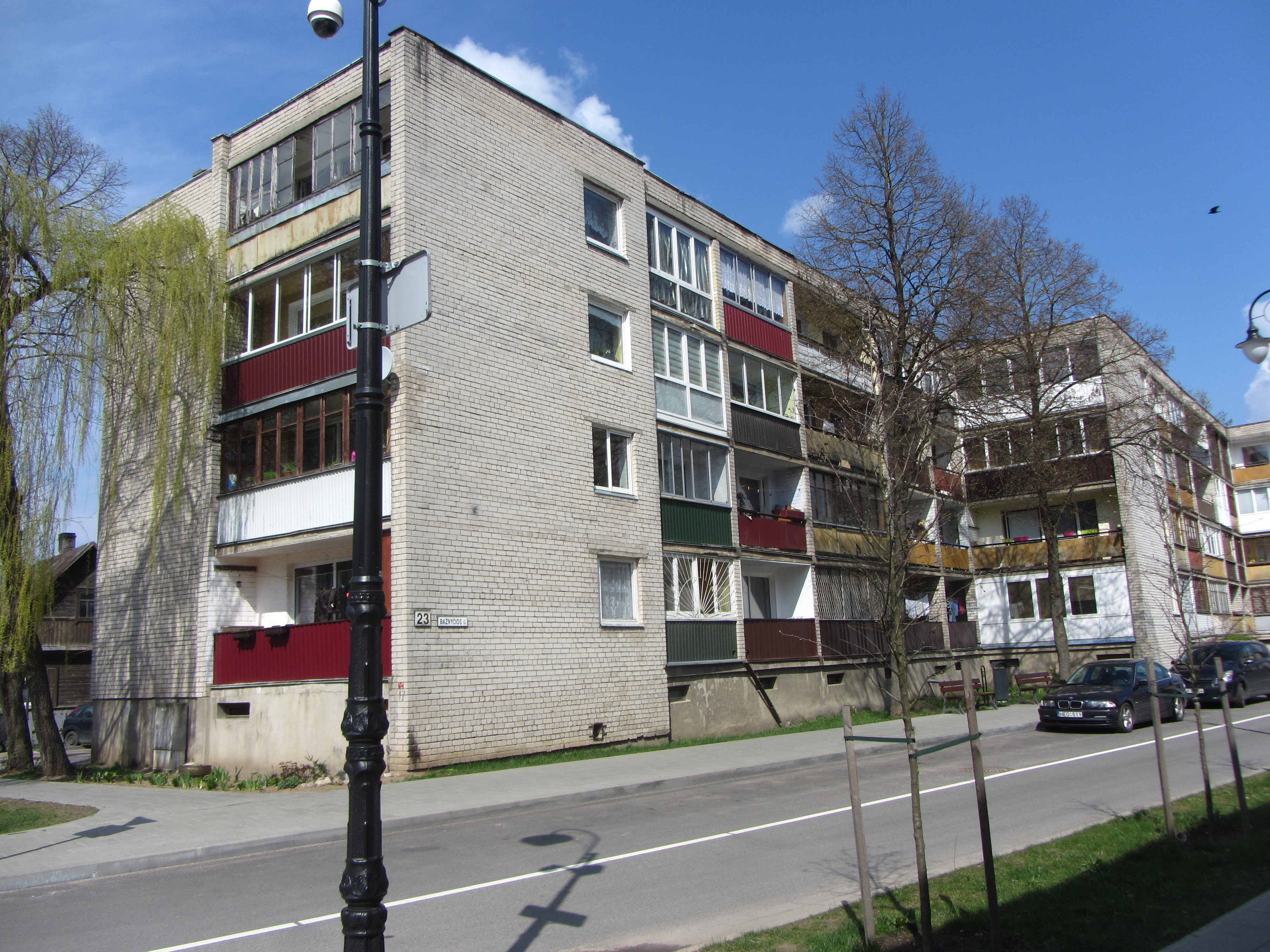 Lentvaris, Lithuania